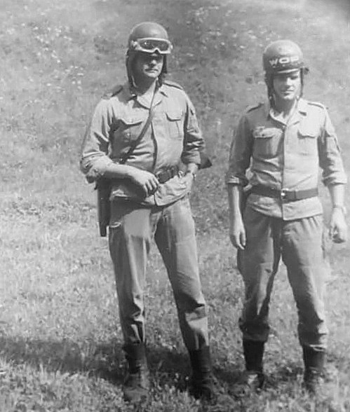 Żołnierze WOP z PM-63 RAK - Strażnica Wojsk Ochrony Pogranicza Pogwizdów